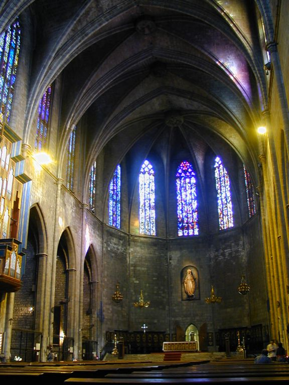 Interior de la Iglesia de Santa María del Pí, Barcelona, España.